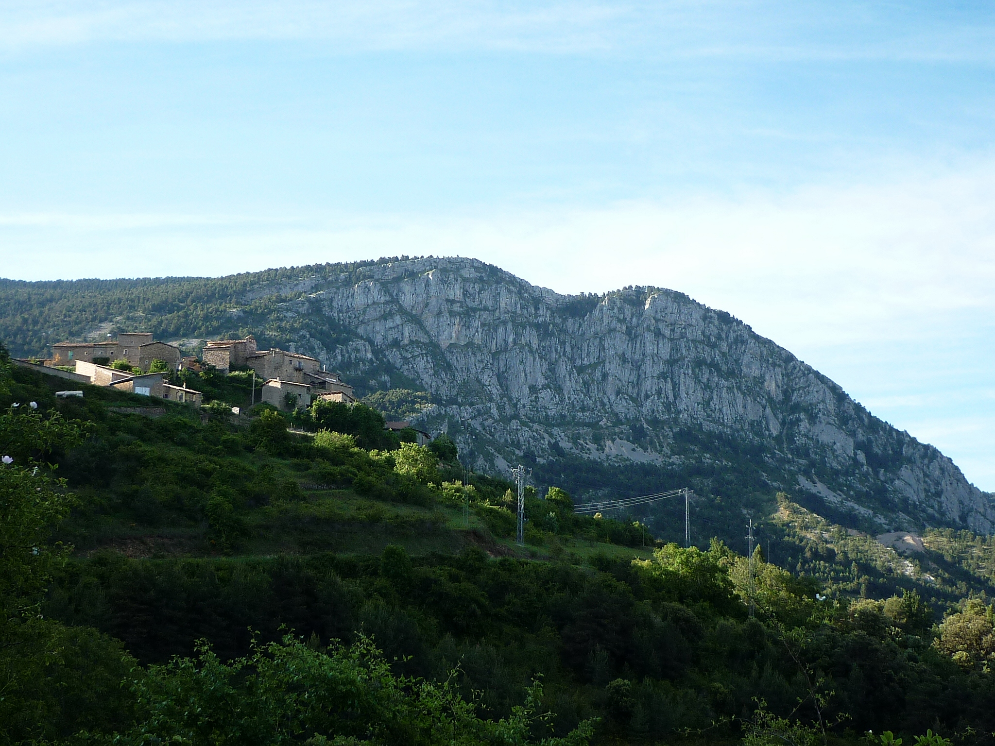 L'Alzina d'Alinyà i la Roca de la Pena (Fígols i Alinyà - Alt Urgell) This is a a photo of a natural area in Catalonia, Spain, with id: ES510196